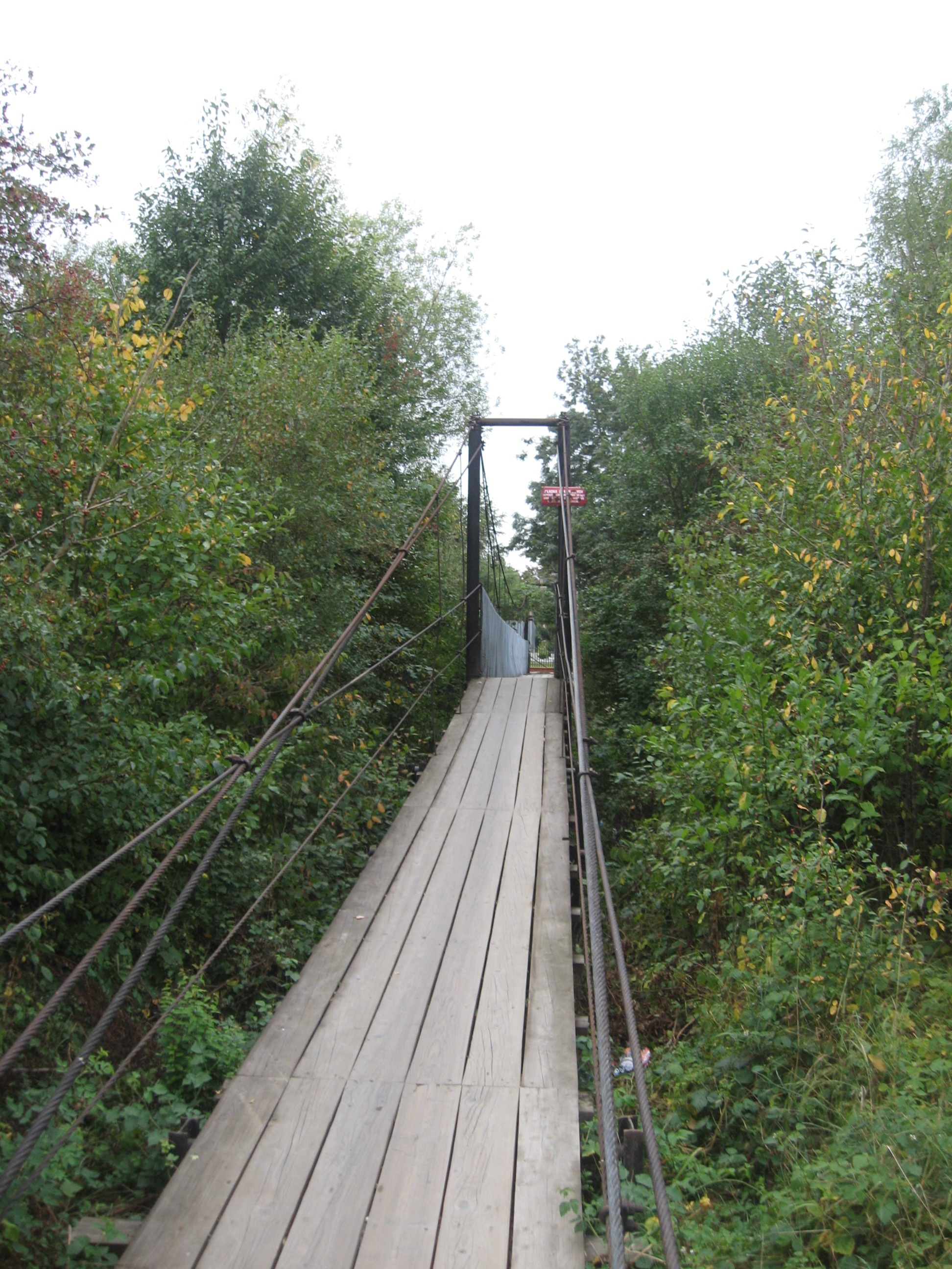 Kładka nad Jasiołką w Roztokach